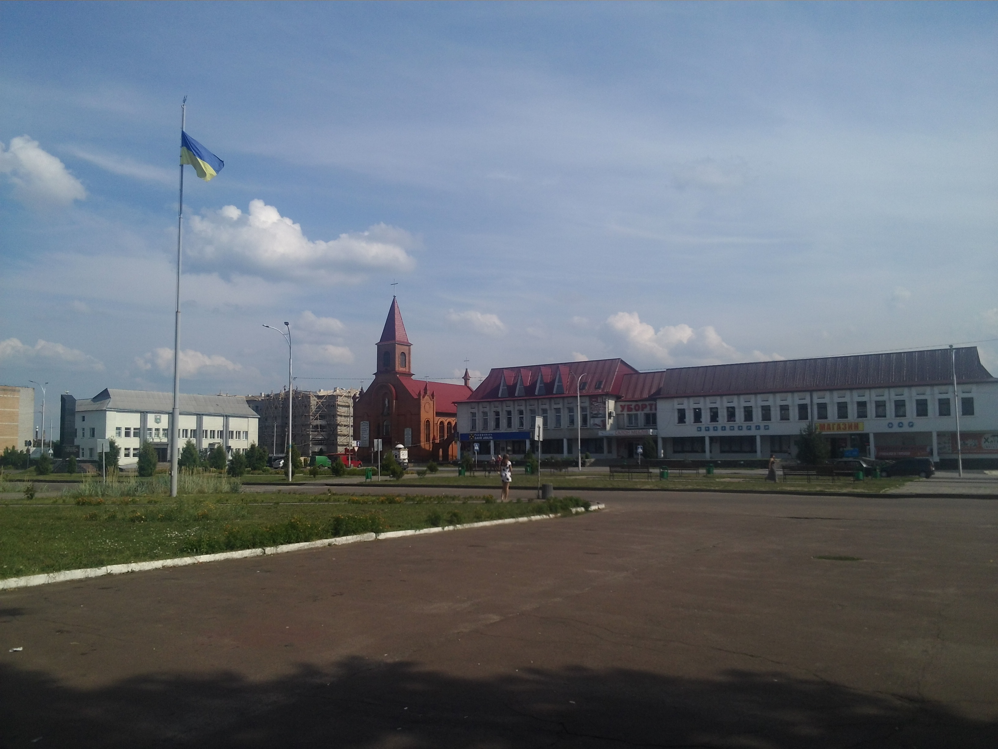 м. Олевськ